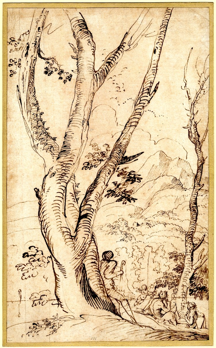 Landschaftszeichnung (1626–1650) mit fünf Figuren von Pietro Testa. (Die Figuren: ein Hirte, zwei Nymphen, ein Satyr und Amor. Technik: Feder mit Braun.)